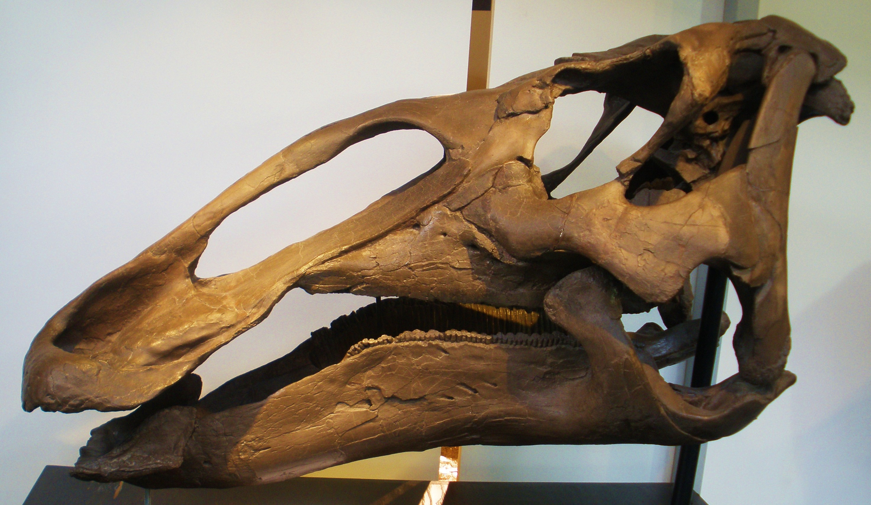 fossil Edmontosaurus